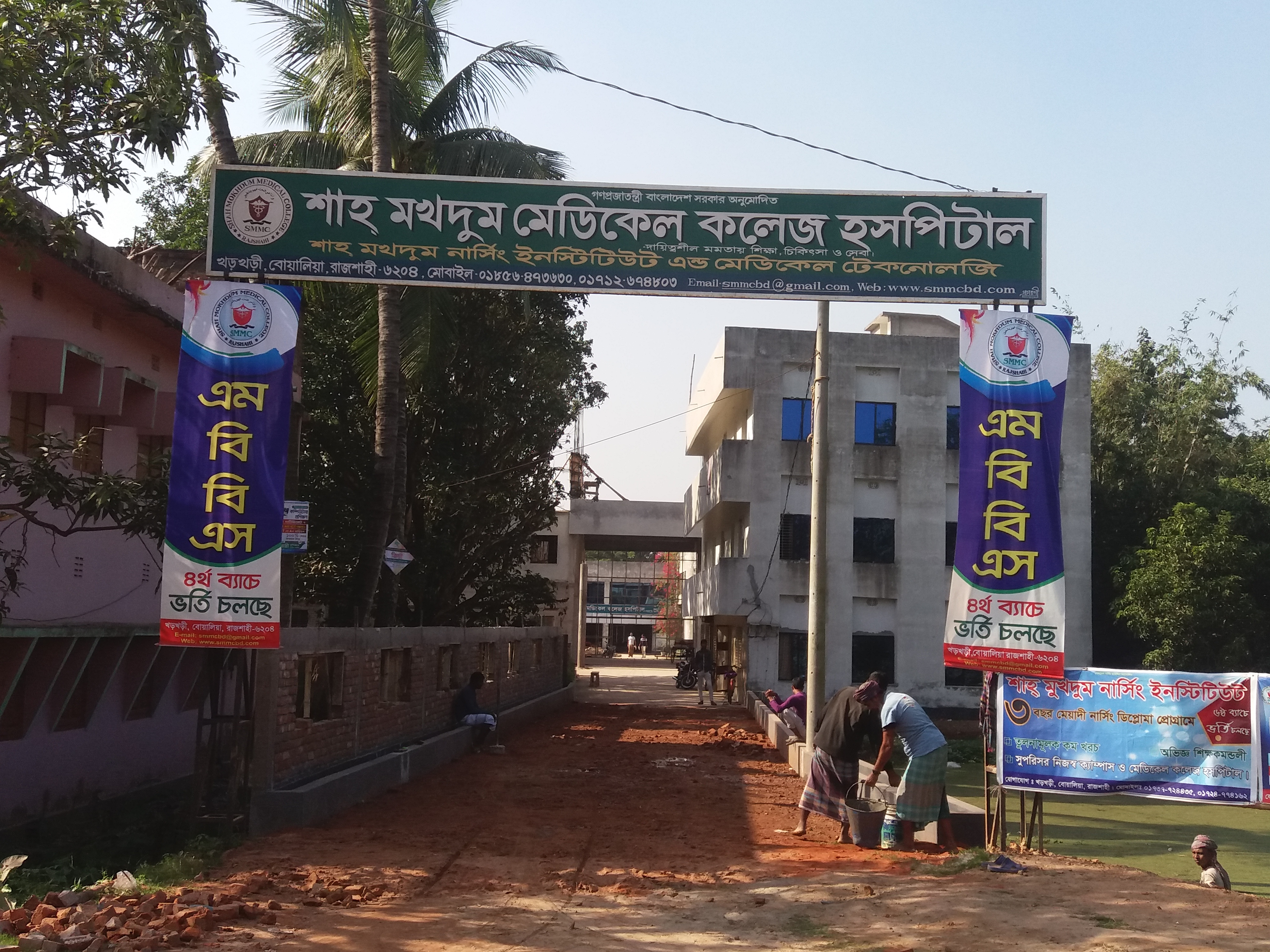 কলেজের প্রধান ফটক